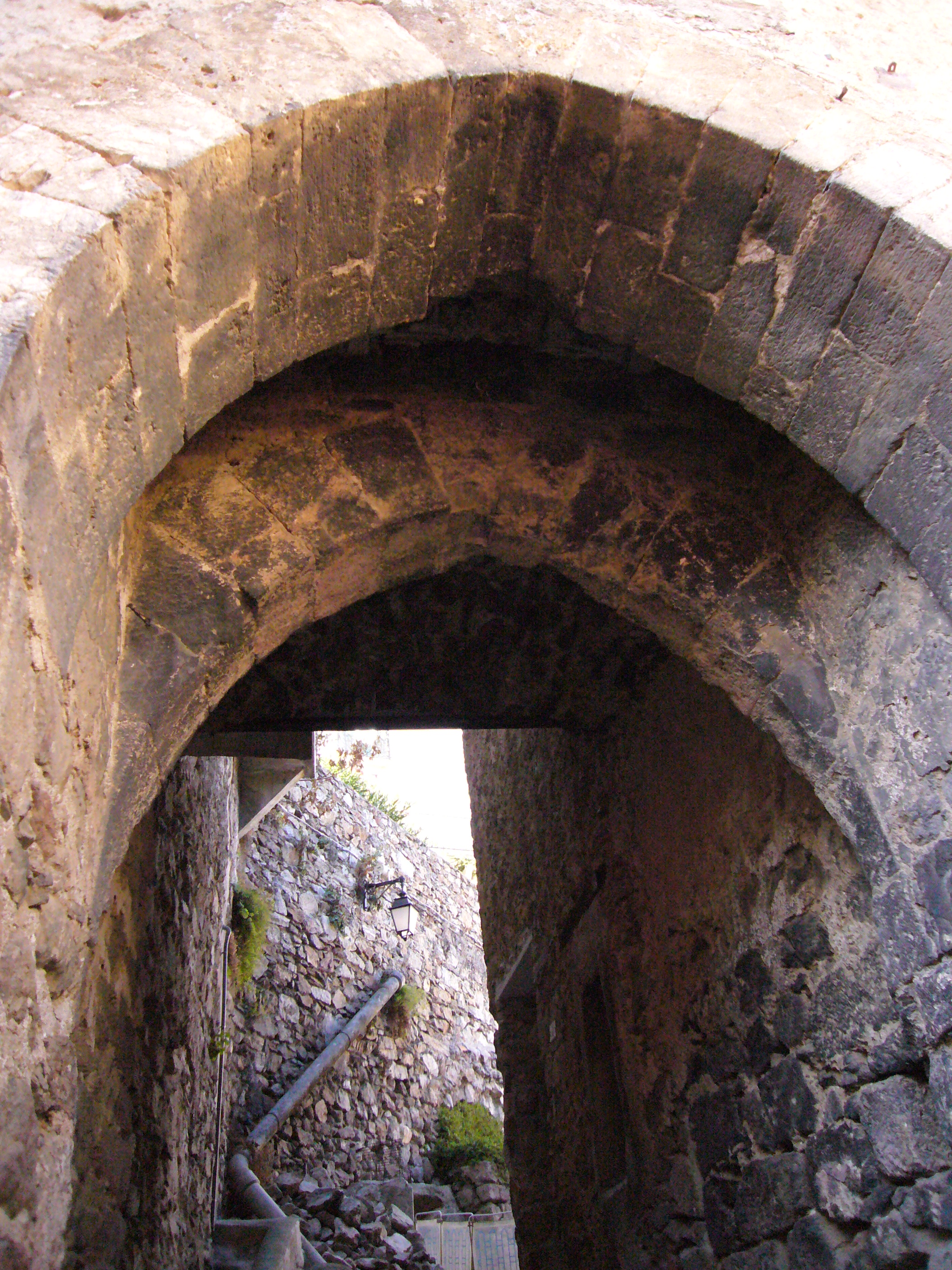 Emplacement de l'ancienne herse de Caramany, situé impasse du Rebelli. (66, France)